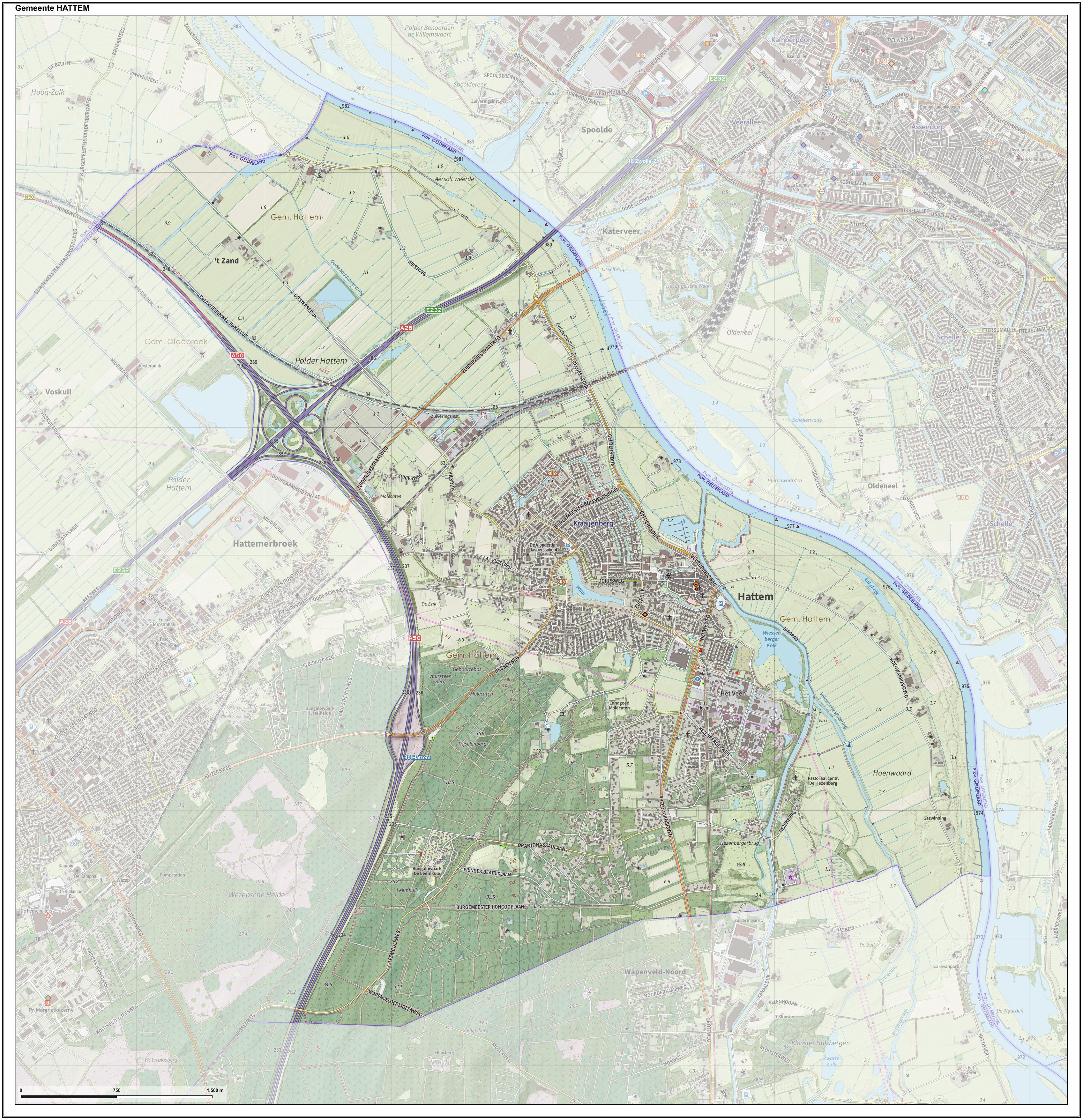 Topografische gemeentekaart. Resolutie: 400 pixels/km. Kaartbeeld samengesteld uit de open geodata van de Top10NL en Top25namen (Kadaster), Creative Commons-BY licentie. Gebouwvlakken uit open geodata BAG extract. Wegen uit de OpenStreetMap, OpenStreetMap community. Reliëfschaduw uit de Actuele Hoogtekaart AHN2. Samenstelling en kleurenschema: Jan-Willem van Aalst, met QGIS. Zie ook de Legenda.